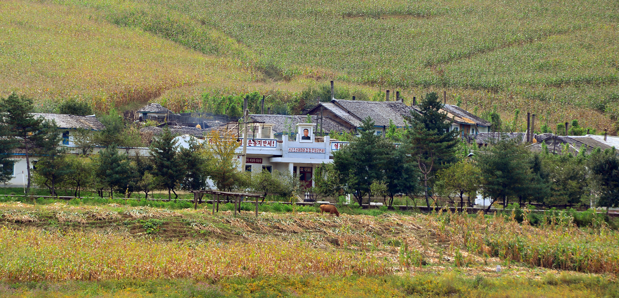 巡道工出品 photo by Xundaogong オグビ駅 오구비역 Ogubi